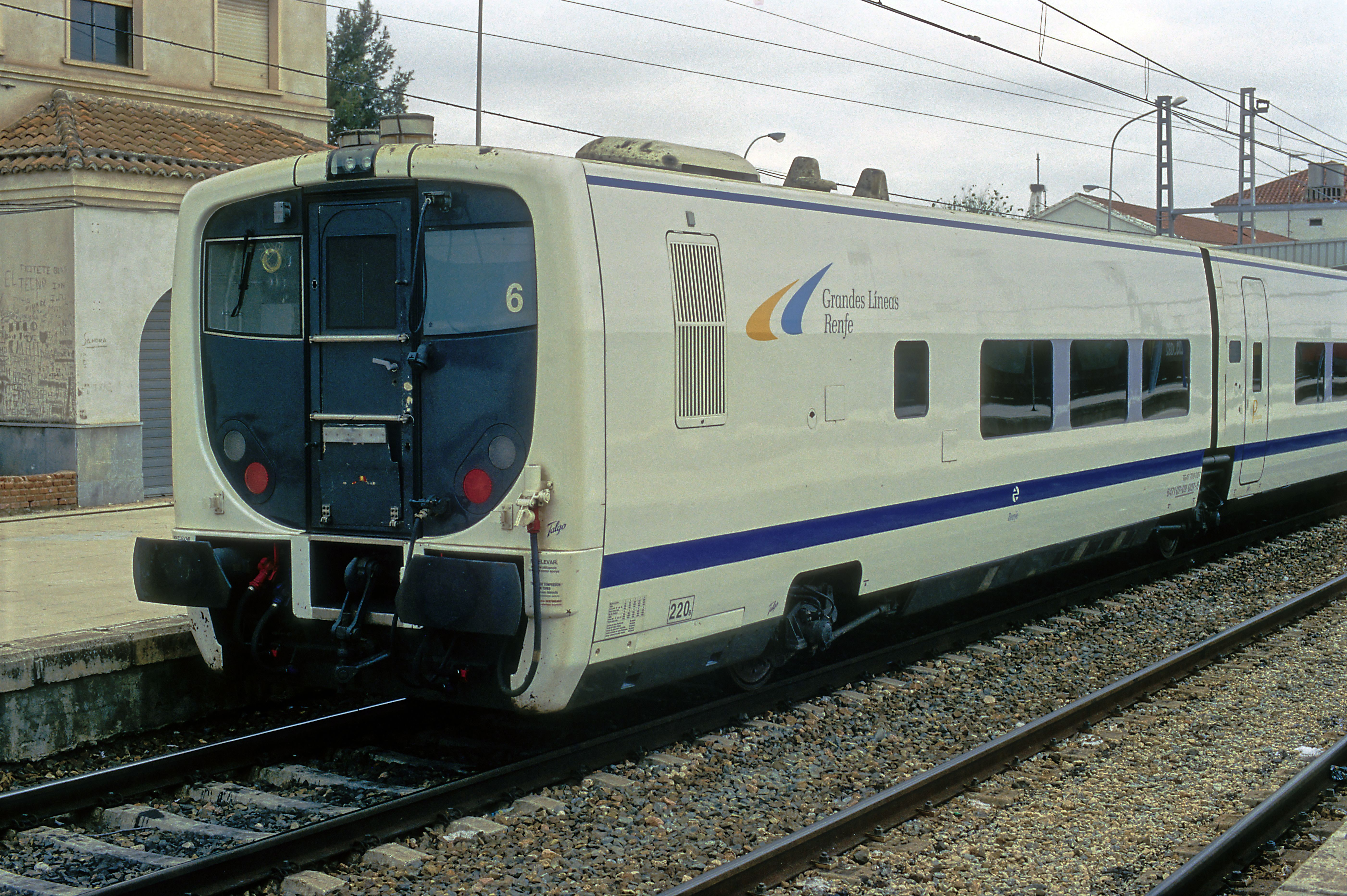 Talgo 7, beide Endwagen sind wagenbaulich identisch. Der Führerstand liegt in Fahrtrichtung rechts, die Energieversorgung erfolgt über die Zugsammelschiene. See also: Talgo.